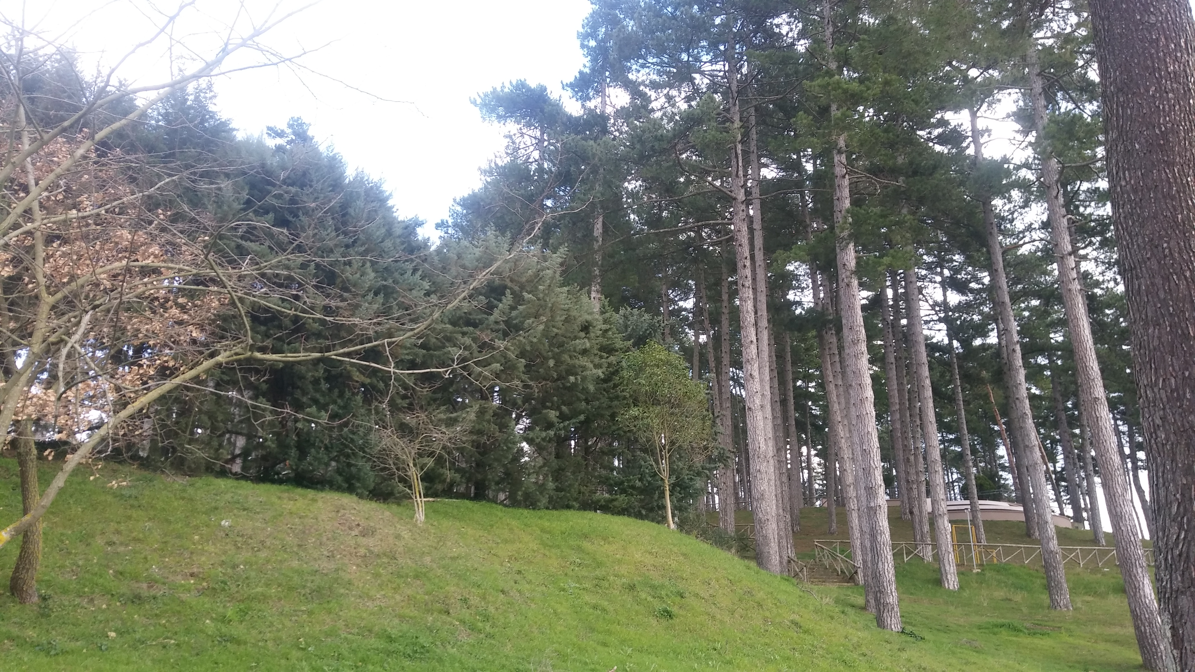 Montecalvo Irpino, pineta